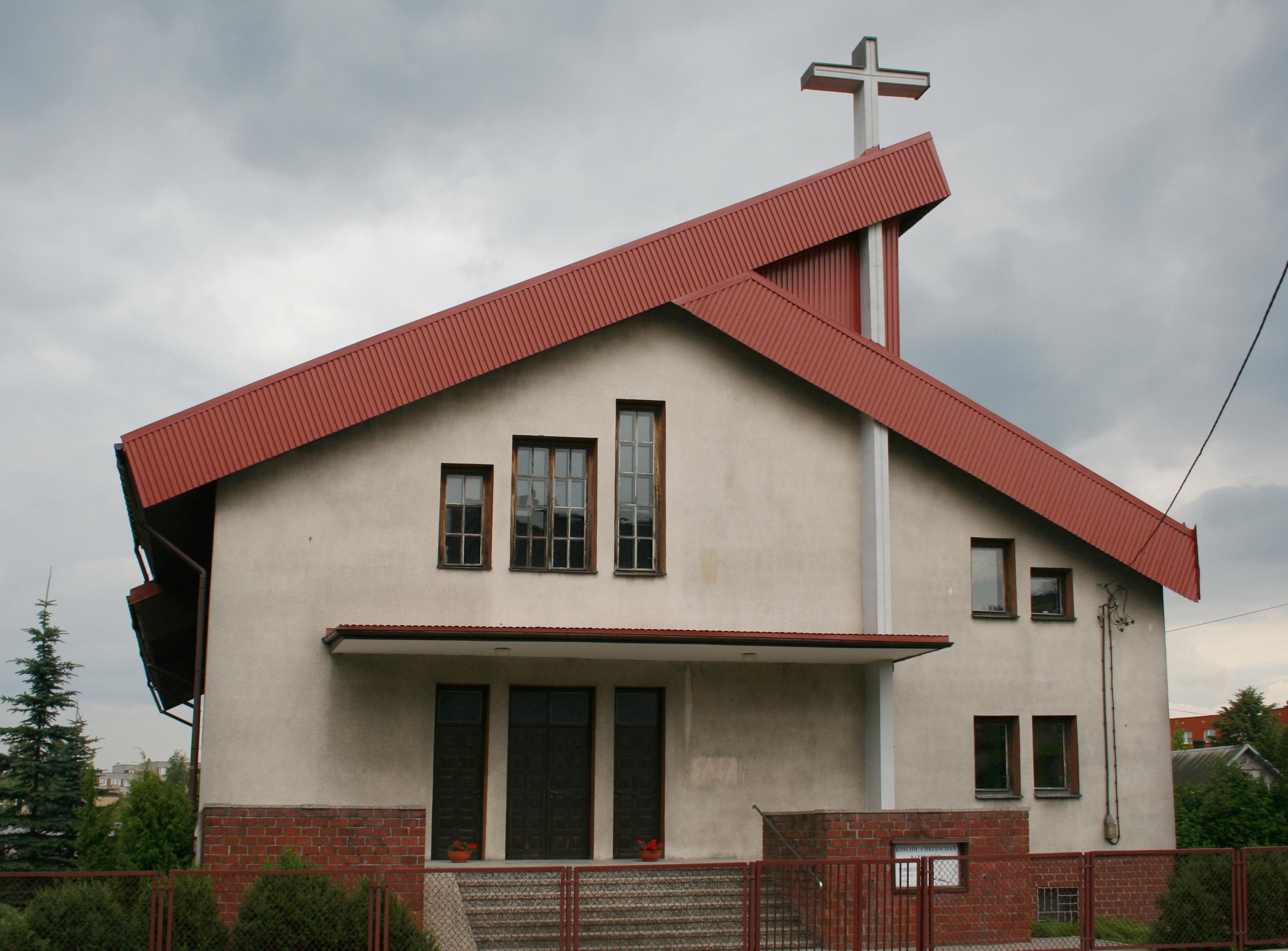 Kościół baptystów w Hajnówce